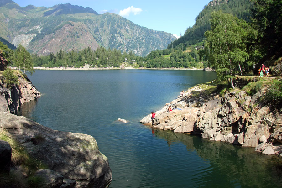 Scorcio del Lago di Antrona in Valle Antrona (VB)